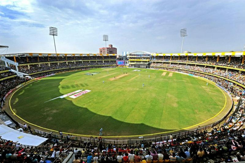 Maharani Usha Raje Cricket Stadium Indore